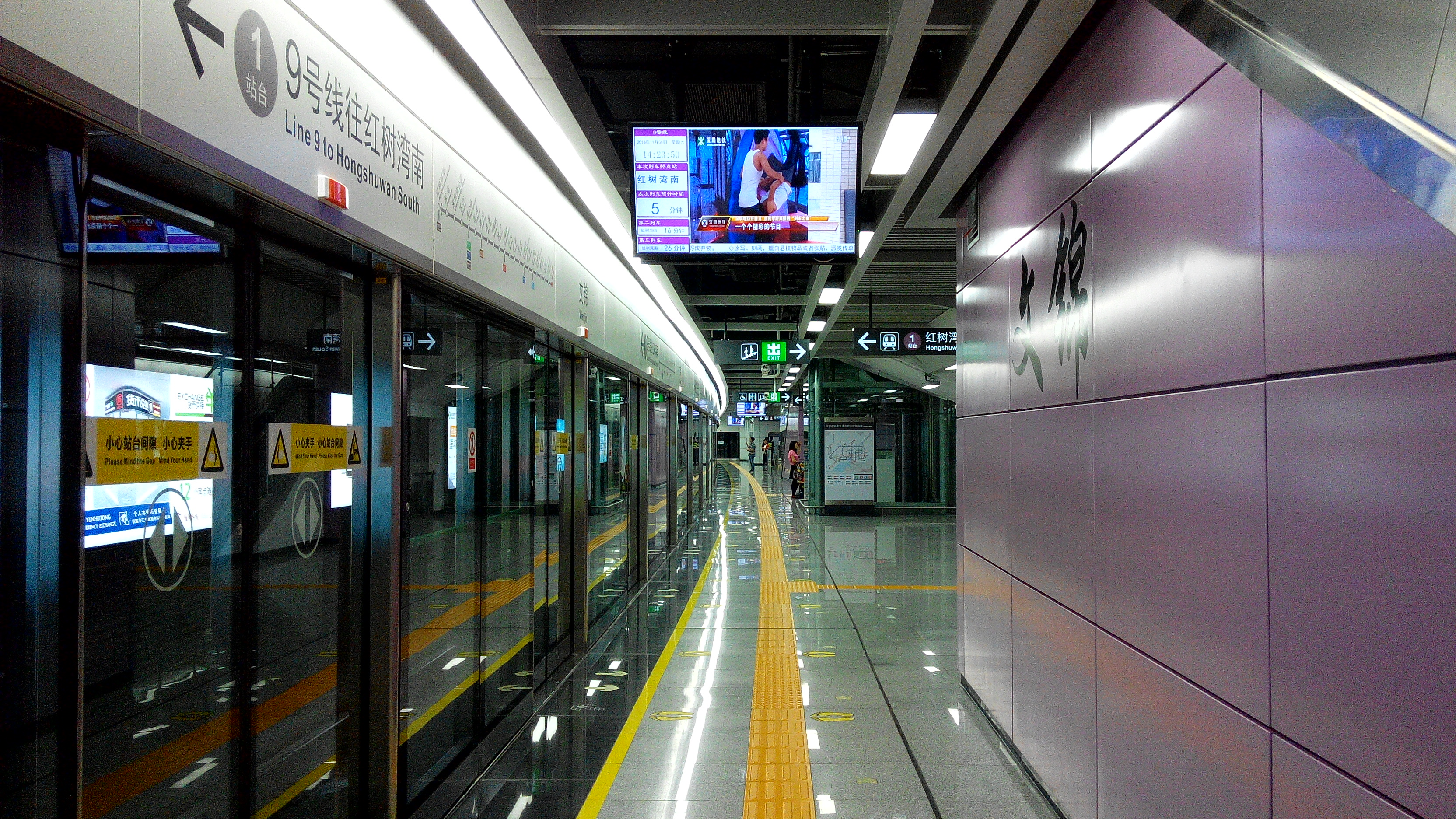 深圳地铁9号线 文锦站1号站台